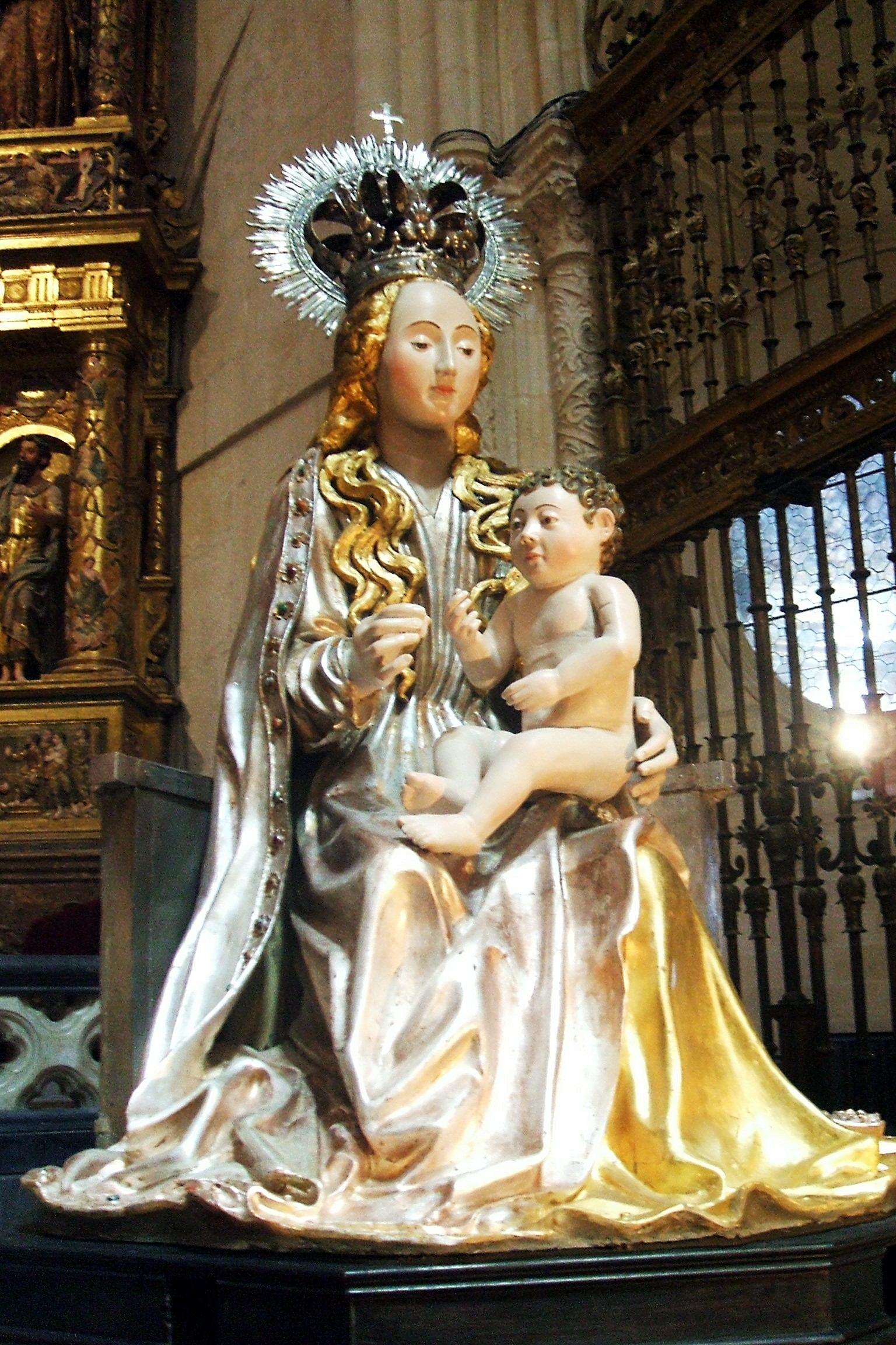 Réplica de la imagen de Santa María la Mayor, en el presbiterio de la Catedral de Burgos, España. La original, ornada en plata, preside el retablo de la Capilla Mayor.